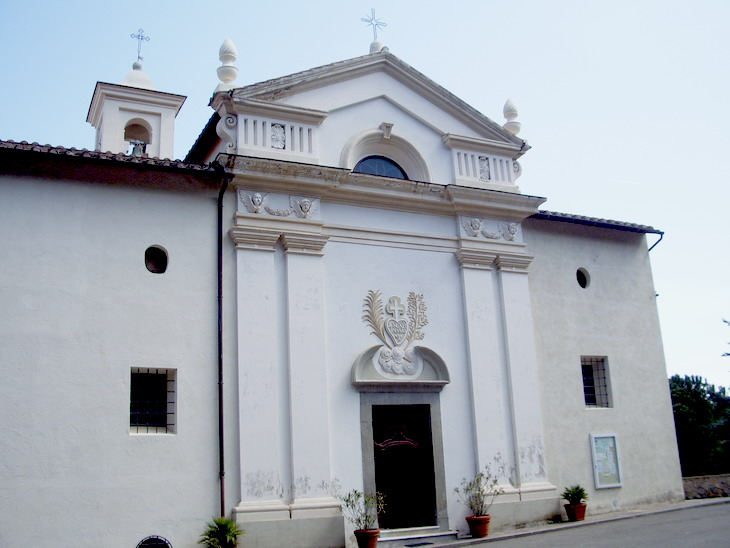 Facciata della chiesa dei Padri Passionisti sul Monte Argentario